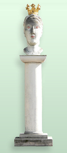 Statue Stadtgöttin Möckern vor dem Rathaus Foto aufgenommen von Benutzer Benutzer:Axel Hindemith, September 2005